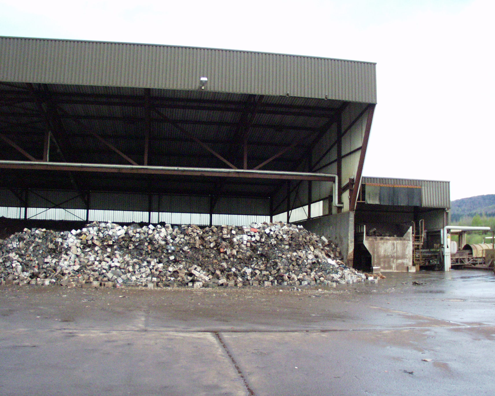 Akkuschrottlagerplatz der Brecheranlage der Harz-Metall GmbH Goslar.